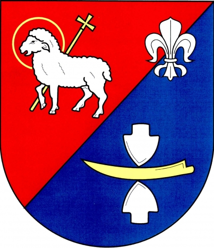 znak,Lukov , okres Třebíč